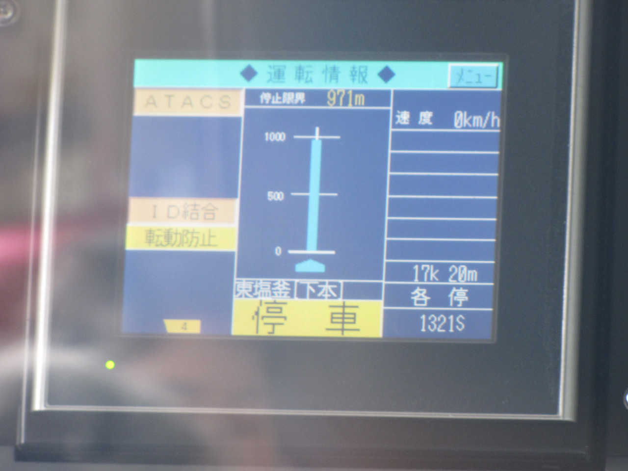 ATACS用モニタ本塩釜駅停車中の内容